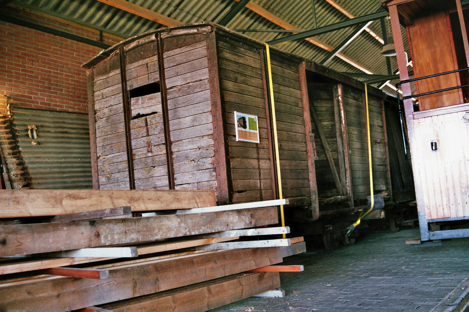 Deze gesloten goederenwagen is door de Dedemvaartsche Stoomtram-Maatschappij in 1907 in de eigen werkplaats te Dedemsvaart gebouwd. Bij het beëindigen van het trambedrijf in 147 verkocht als landbouwschuur. In 2009 is hij in bezit van de de Stoomtrein katwijk-Leiden gekomen. Camera: Canon Eos 3000 Film: Fujifilm Superia 400ISO